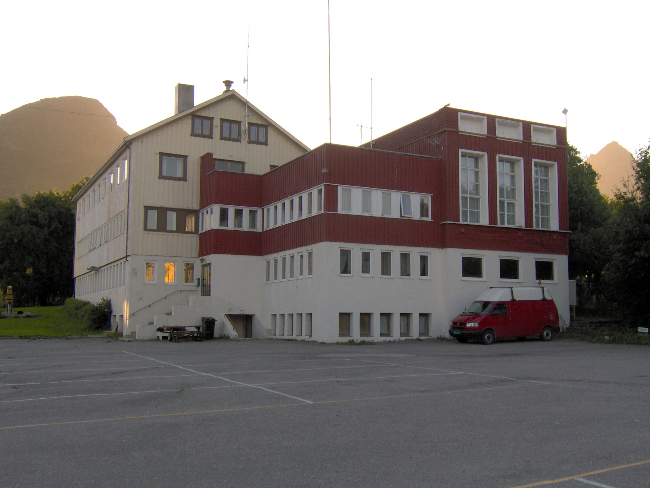 Bø rådhus